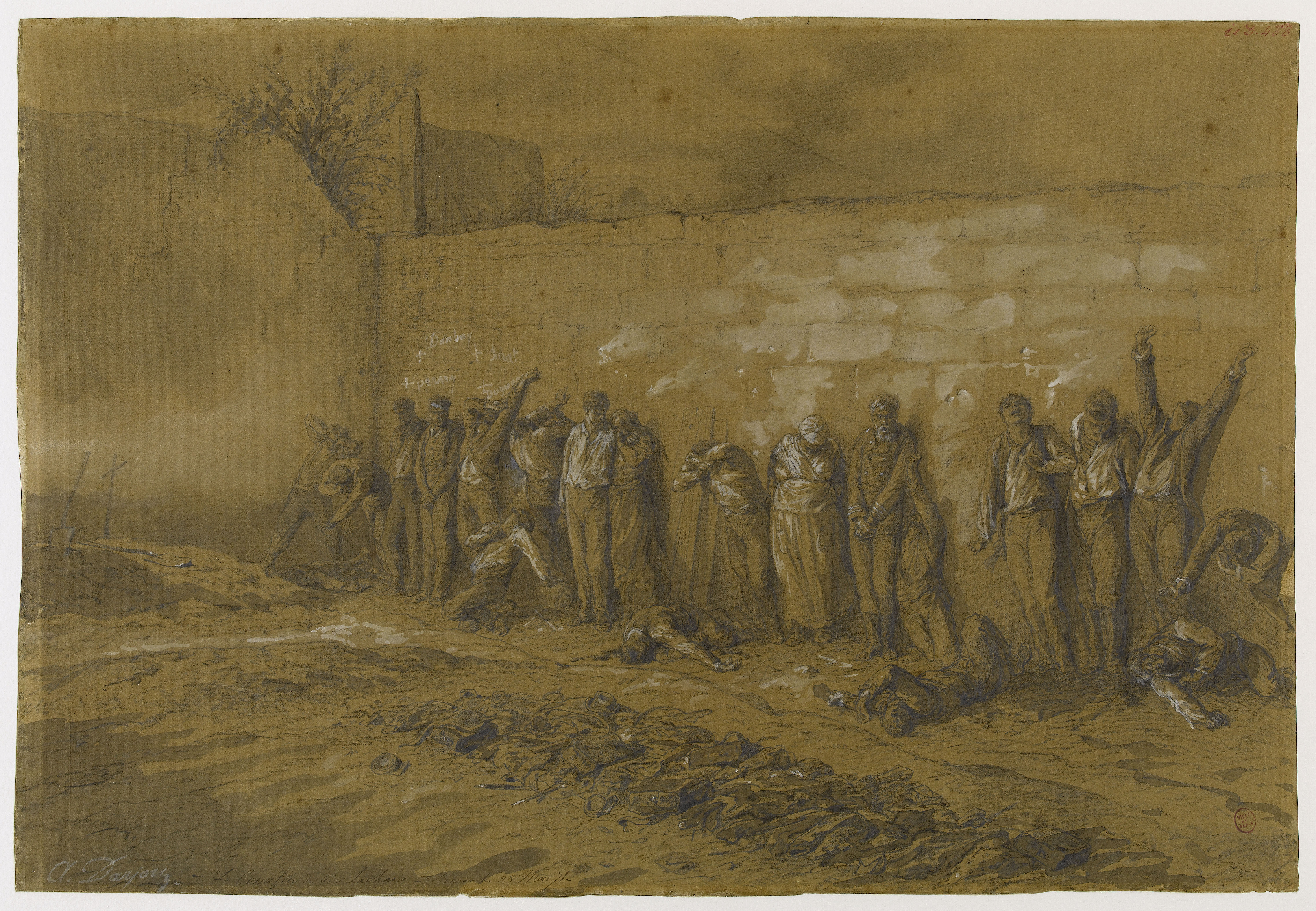 Autre titre : Le mur des Fédérés. Exécution des prisonniers par les versaillais. Dessin à la mine de plomb, lavis d'encre de chine, rehauts de gouache blanche.